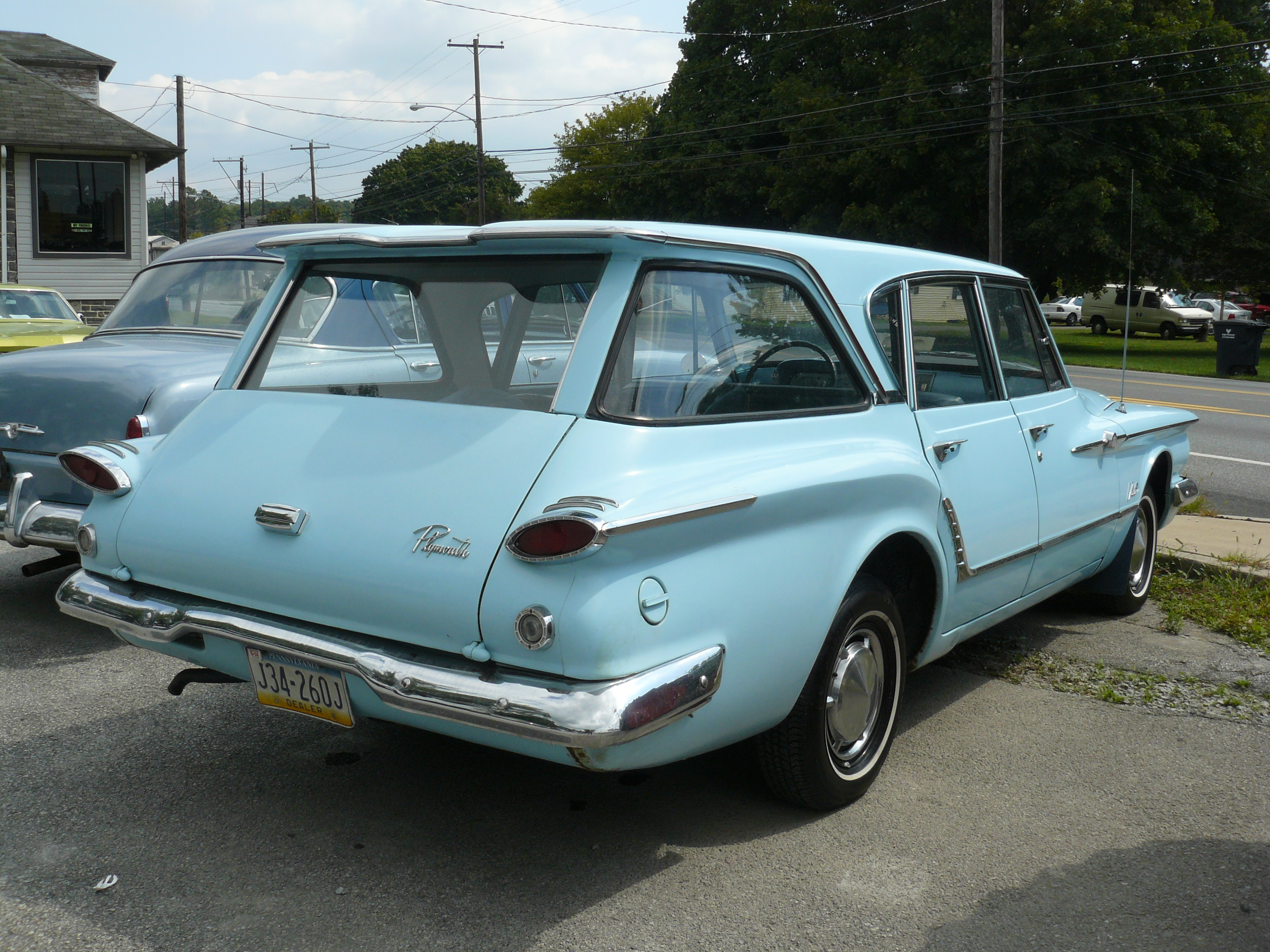 Lincoln Hyghway 2013